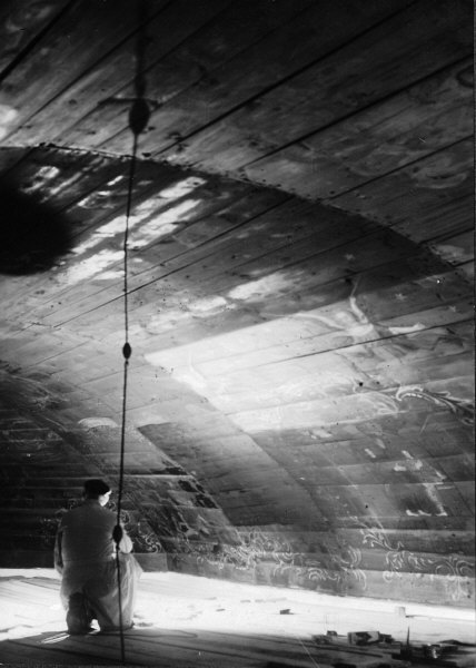 Taket under arbete 1954. Kategori: (03) Målningar på träTaket under arbete 1954.